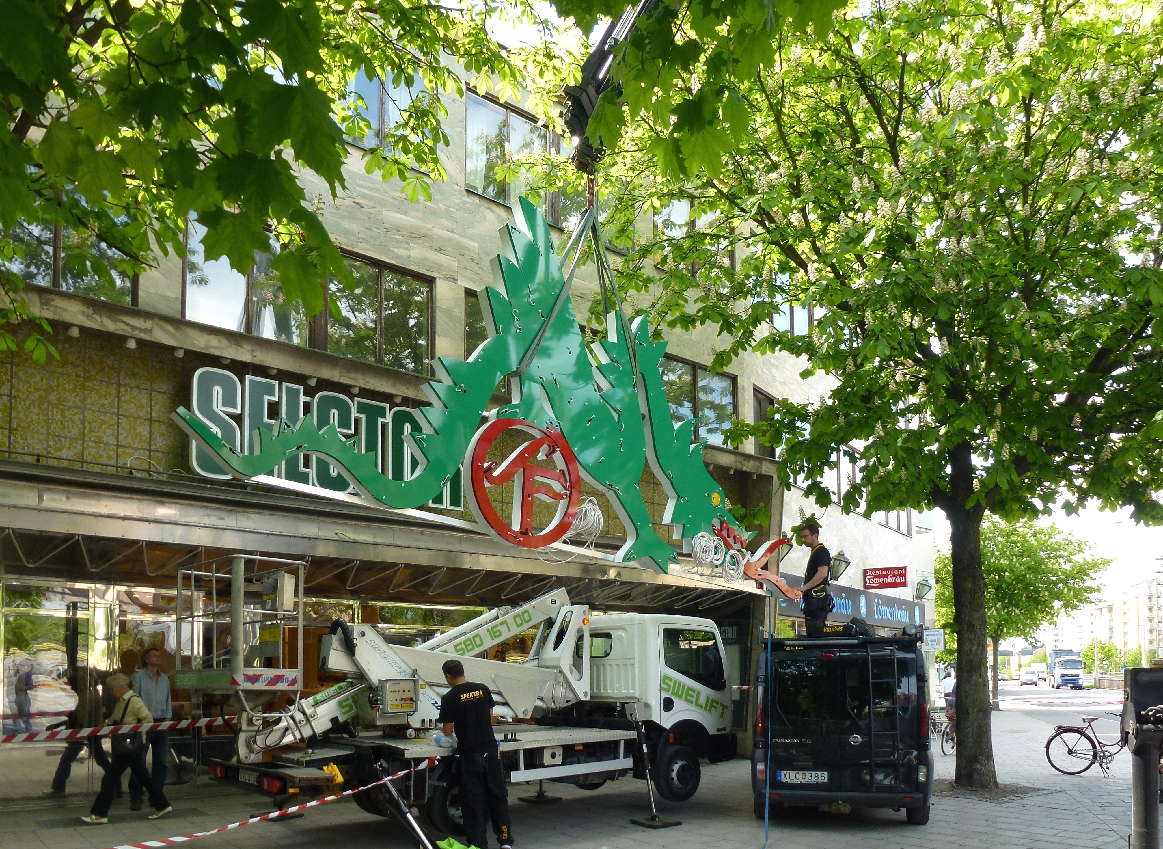 Före detta "Biograf Drakens" renoverade neonskylt